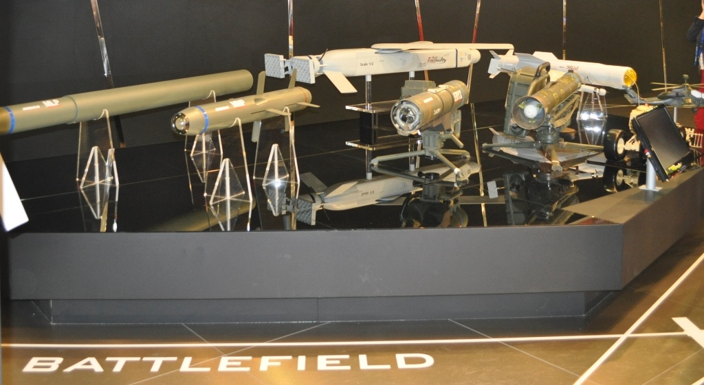 Stand MBDA au Salon du Bourget 2011, Battlefield engagement de gauche à droite au premier plan Missile Longue Portée Missile Moyenne Portée Eryx Milan Au deuxième plan Fire Shadow Pars 3 LR